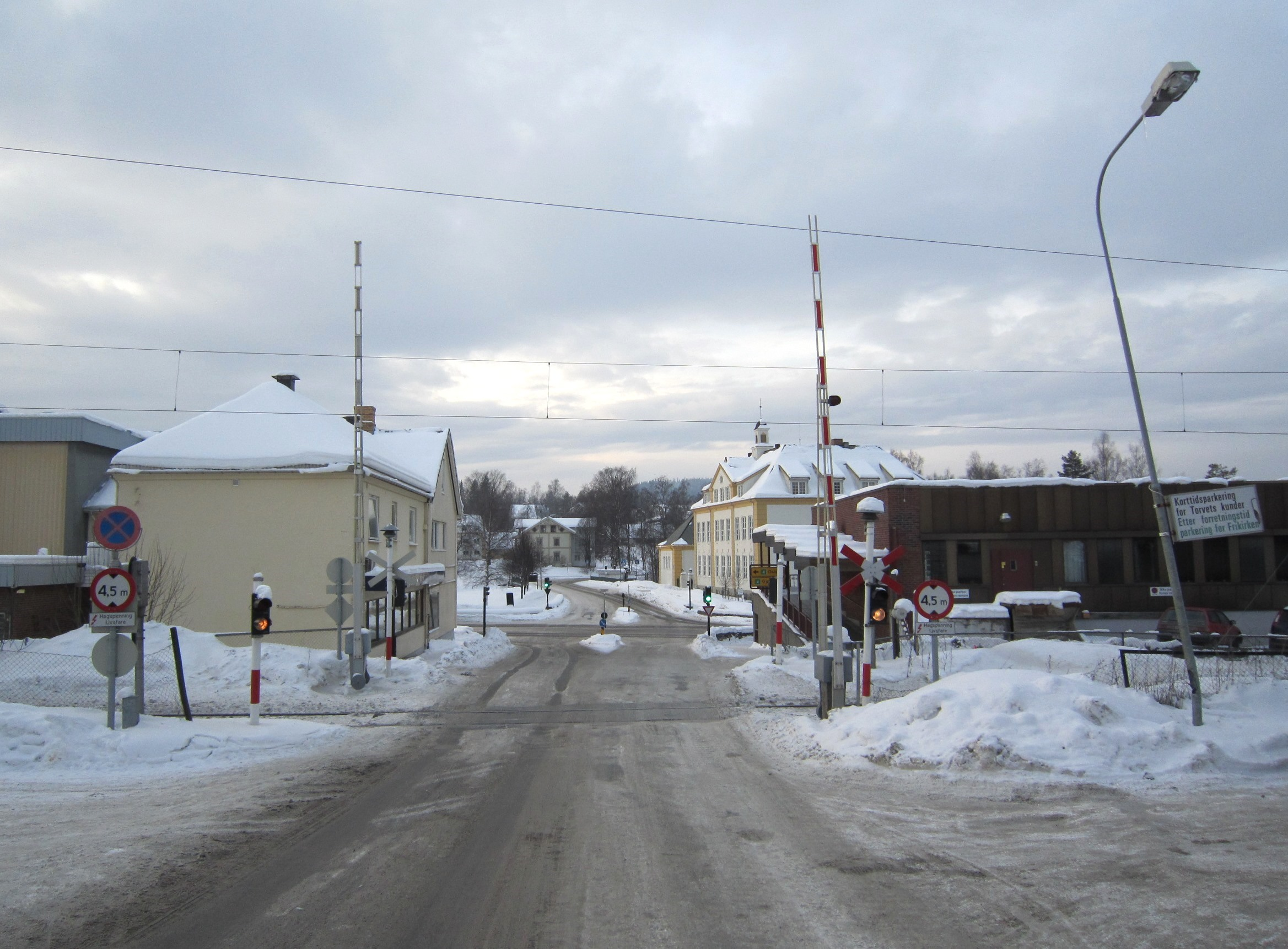 Østvollvegen (FV2350, tidl. FV82) krysser Gjøvikbanen på Raufoss.